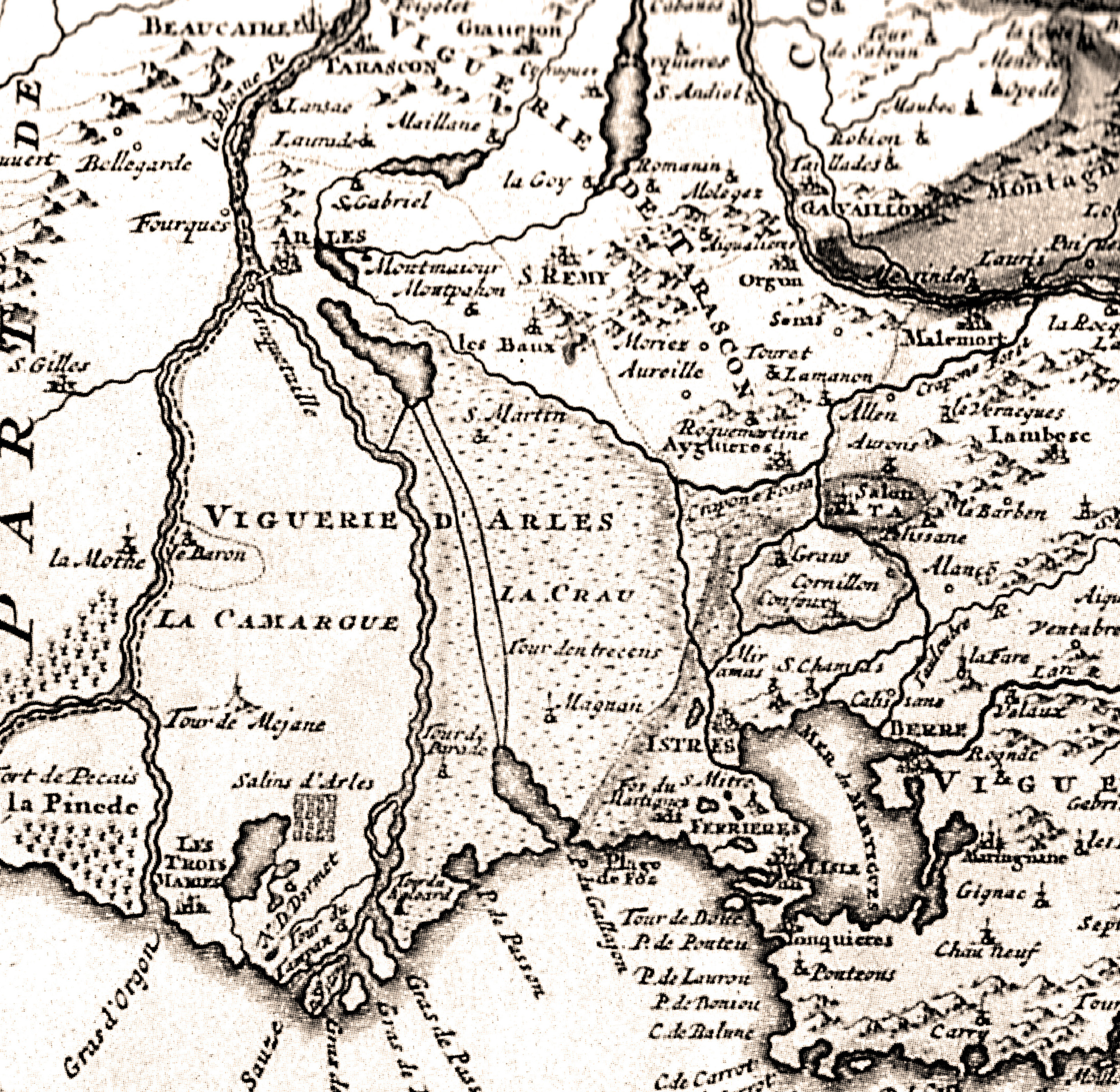 Carte de Camargue par JB Homann